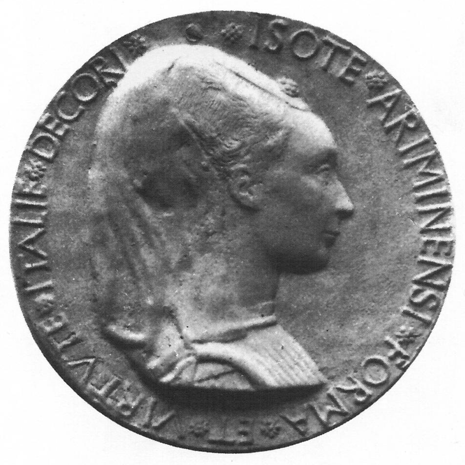 Matteo de' PASTI, Portrait of Isotta degli Atti